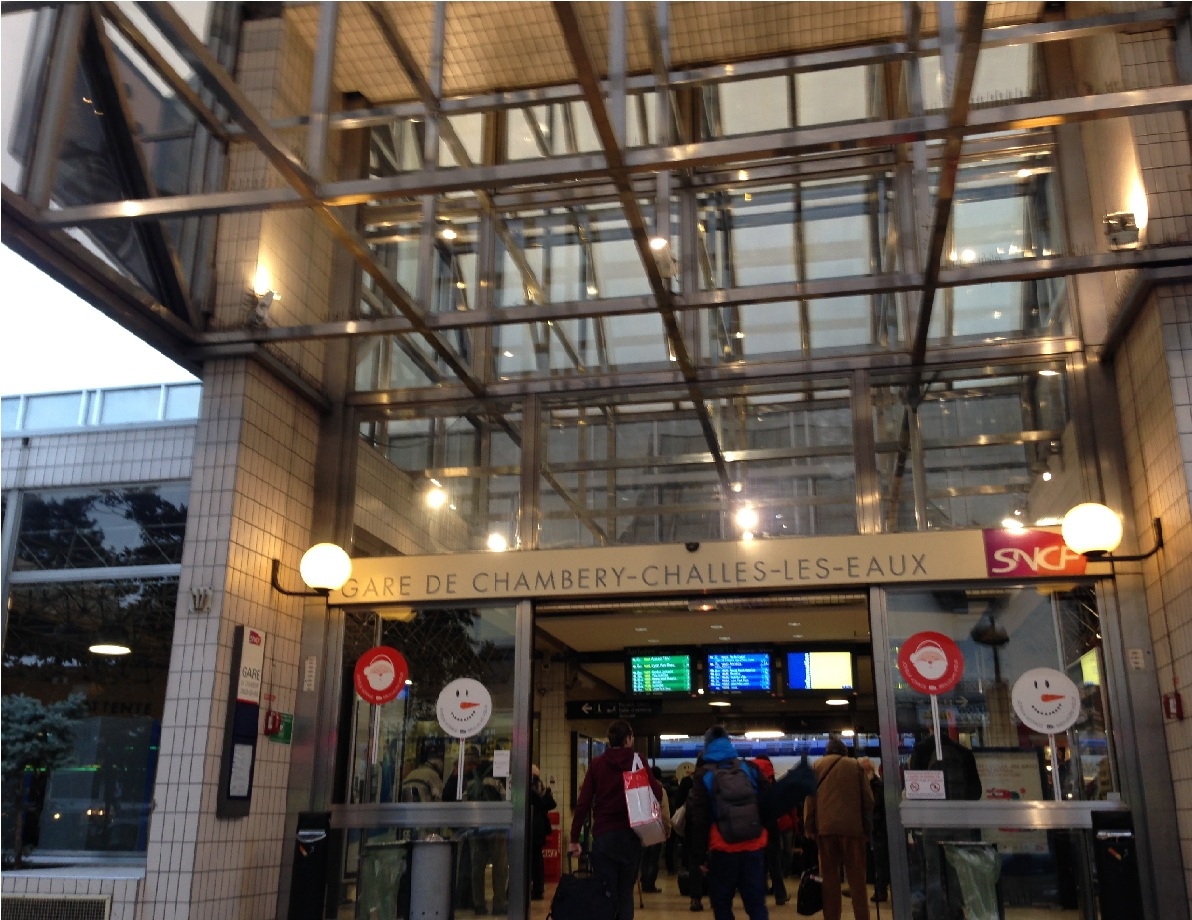 Gare de Chambéry - Challes-les-Eaux-2014